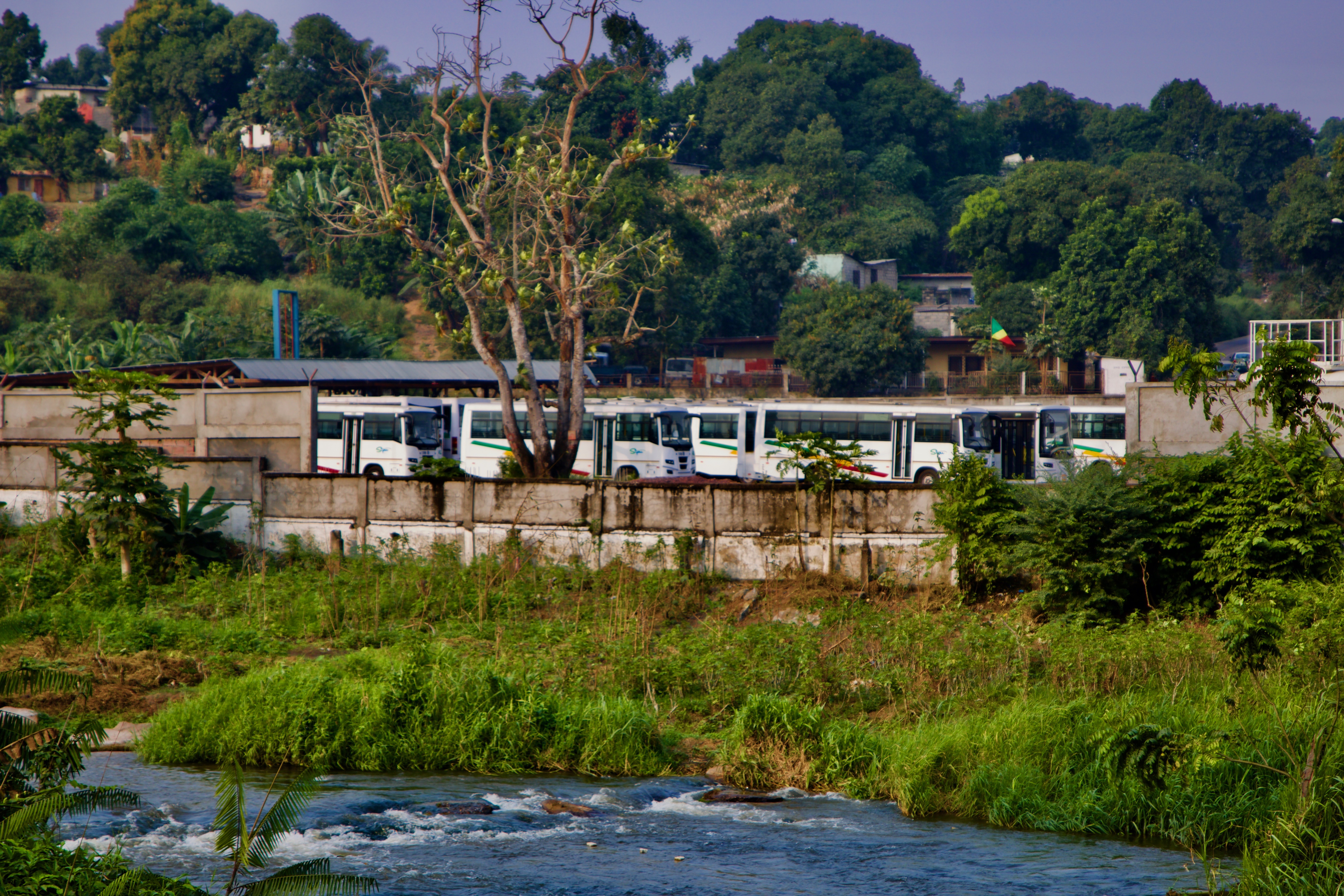 Photographie montrant la magie entre nature et création de l'homme This is an image with the theme "Africa on the Move or Transport" from: Congo